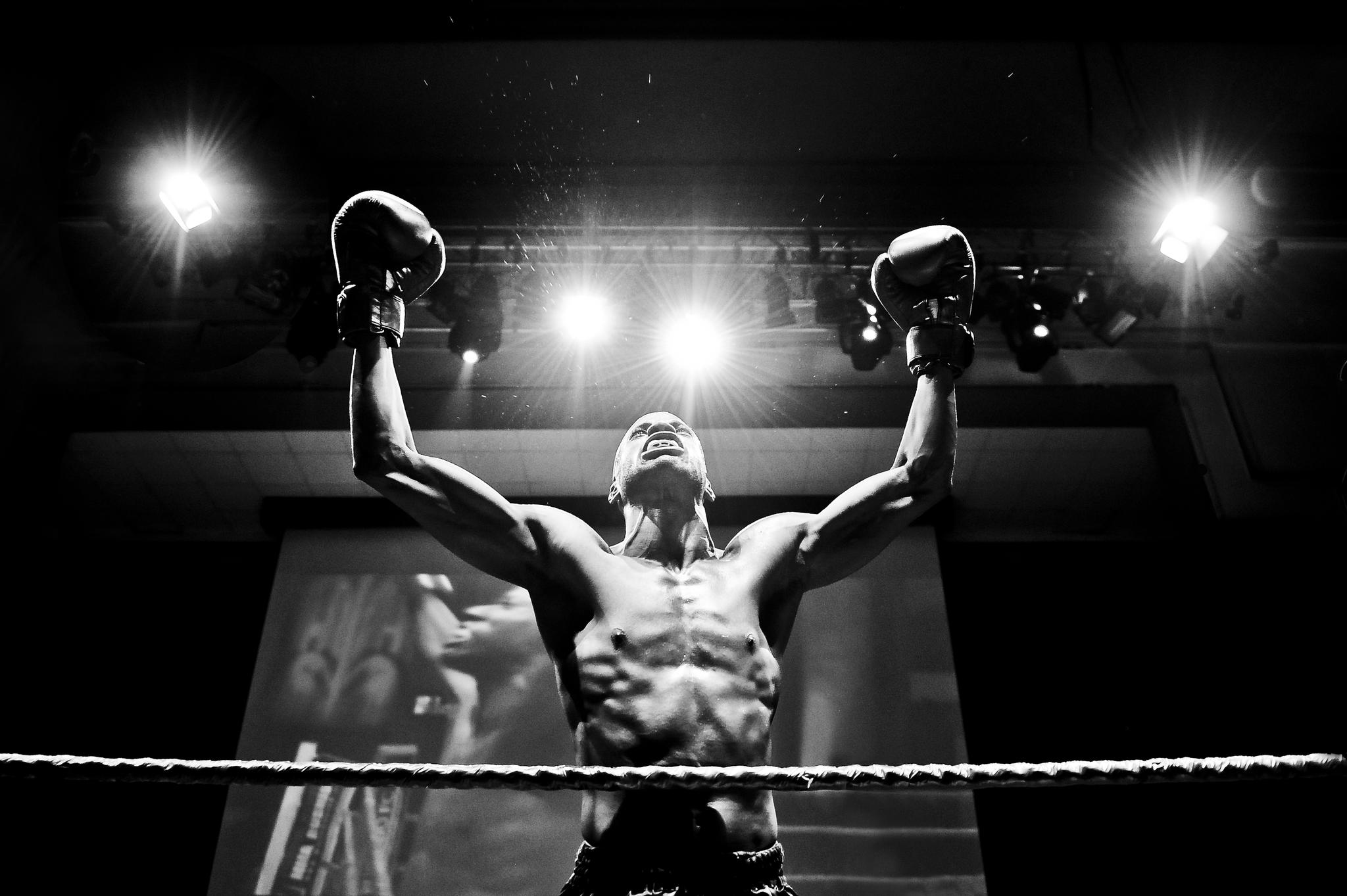 Победитель, фотограф Андриус Петручениа